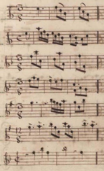 Table du volume I des manuscrits de Venise (incipit des sonates 1 à 7, K. 148 à 154).